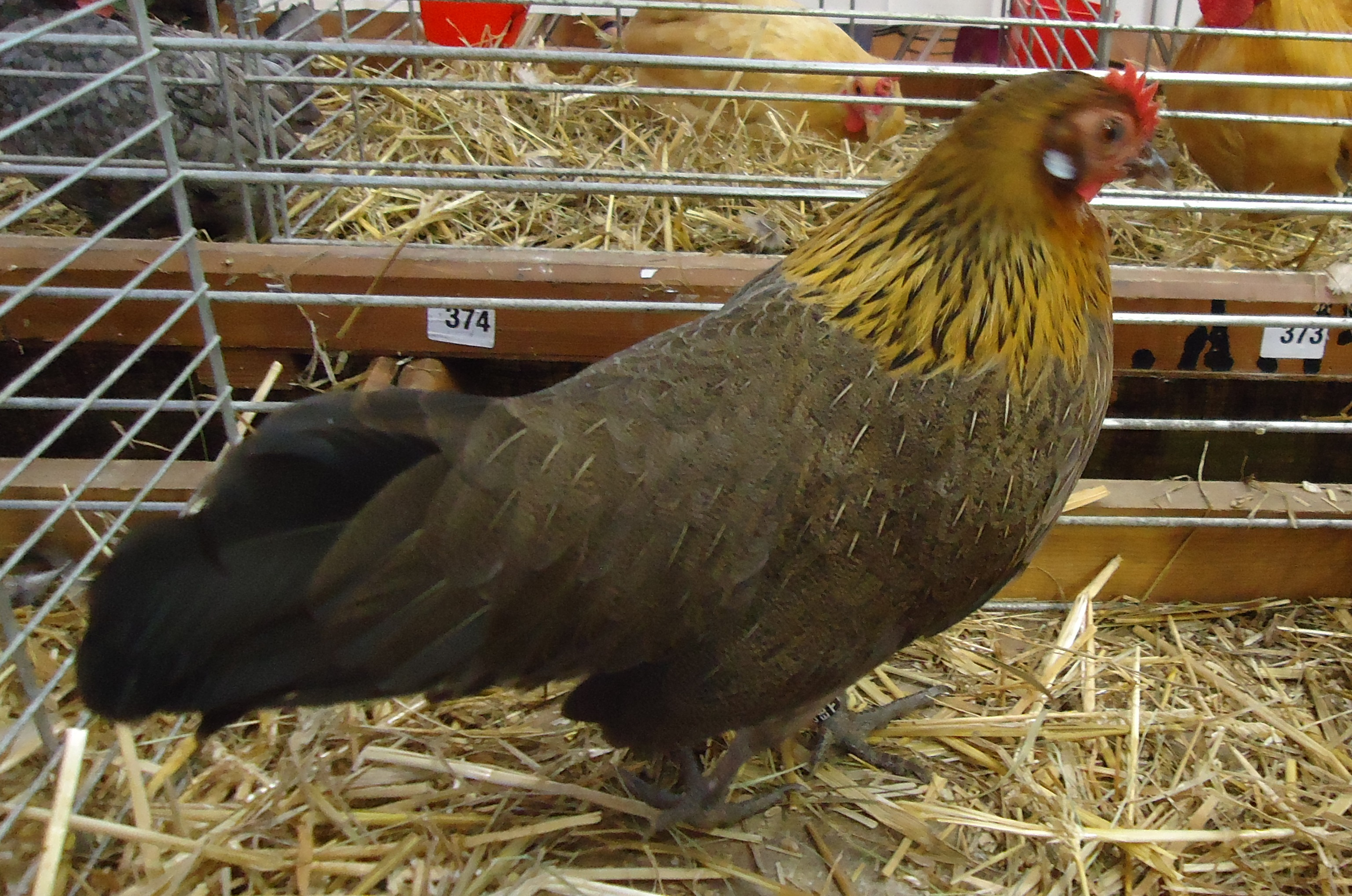 Poule